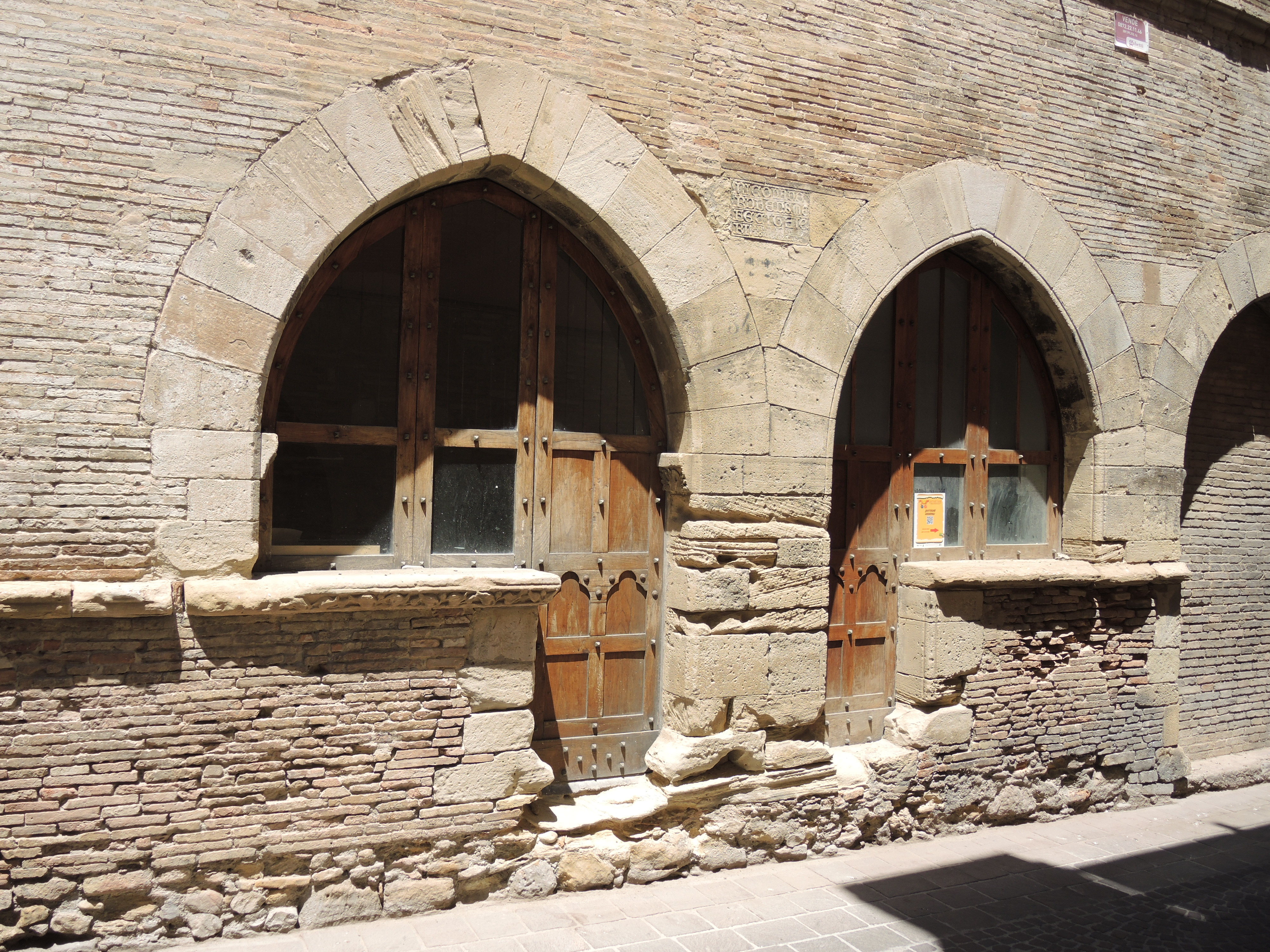 Lanciano - Botteghe medievali